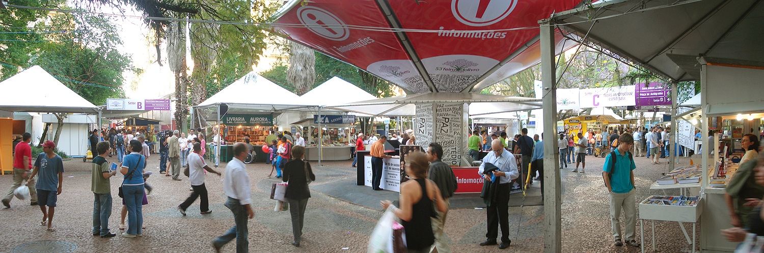 53ª Feira do Livro em Porto Alegre, Brasil, 2007